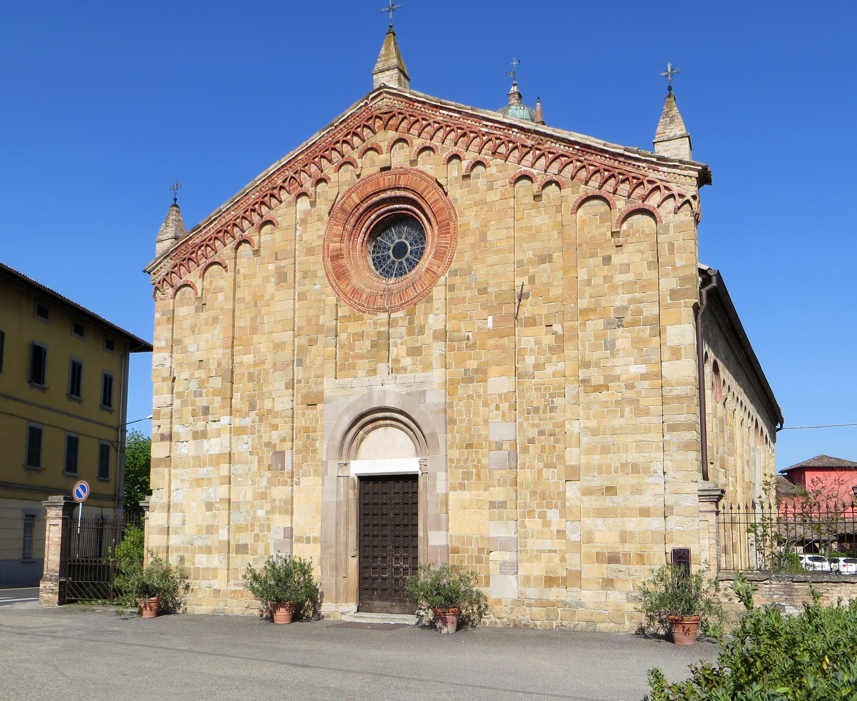 Pieve di San Geminiano (Vicofertile) - facciata